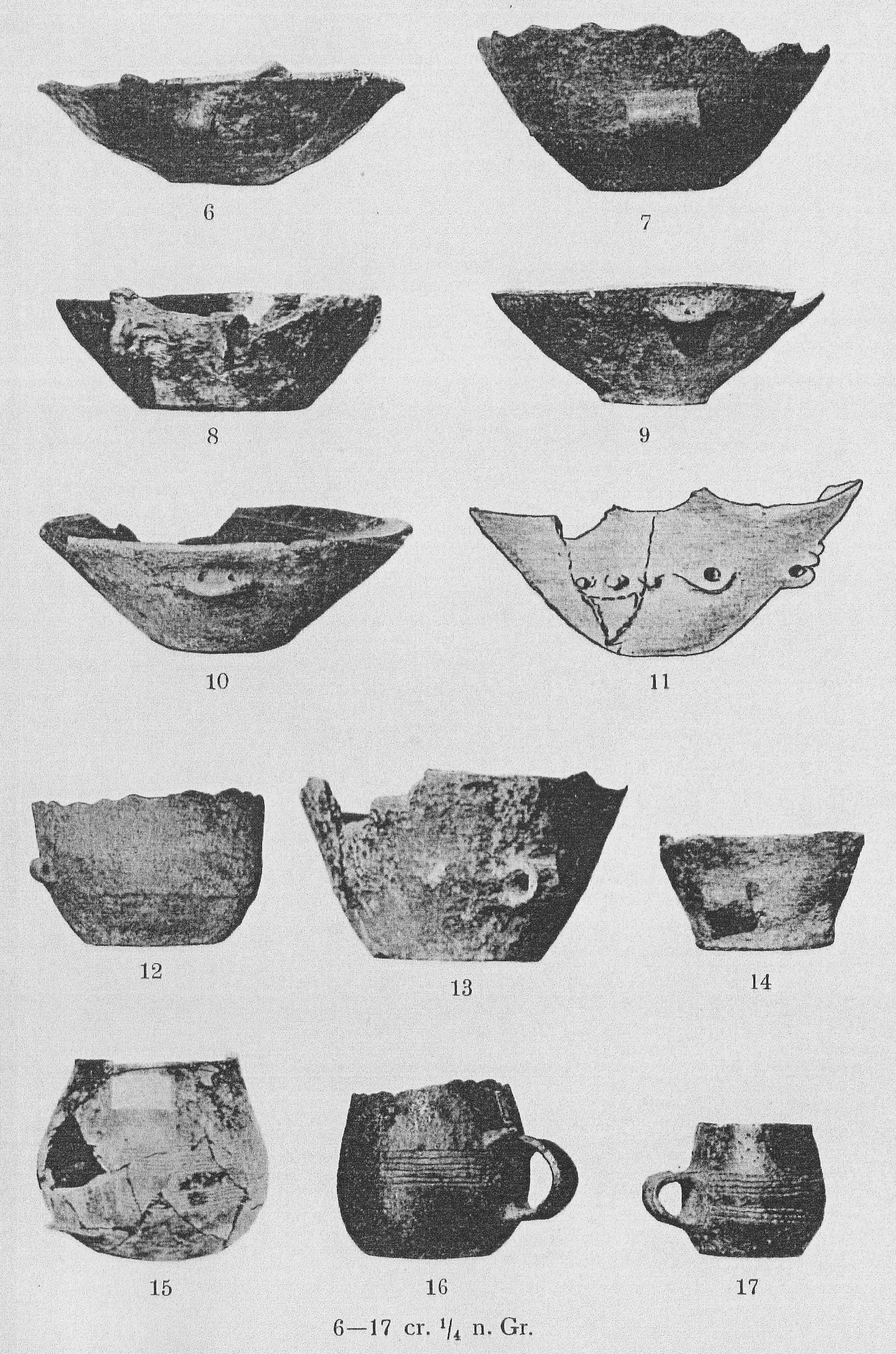 Funde aus dem Großsteingrab Drosa